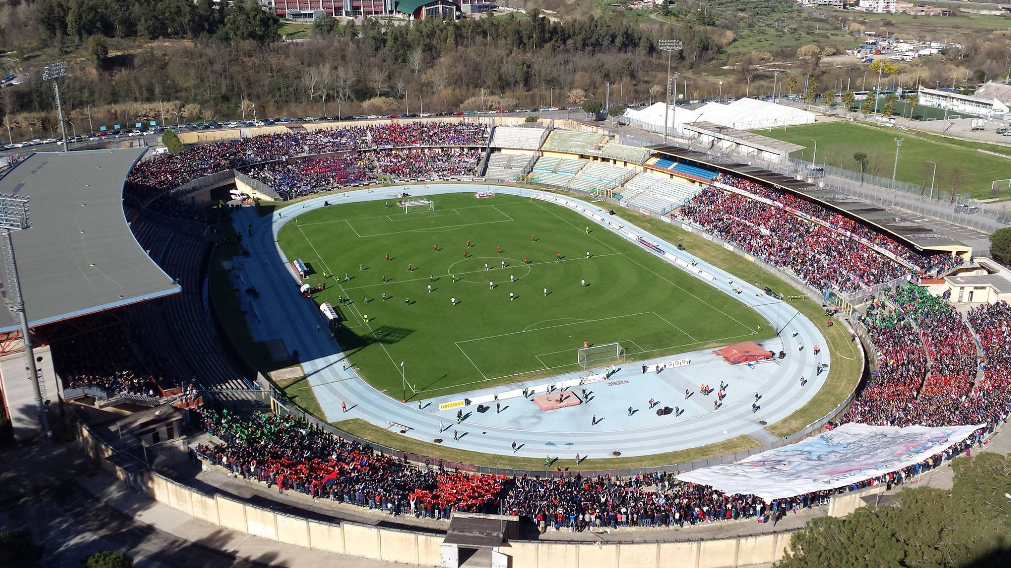 Stadio San Vito-Marulla gremito da 18.000 spettatori visto dall'alto durante Cosenza - Aversa Normanna del campionato Lega Pro Seconda Divisione 2013-2014